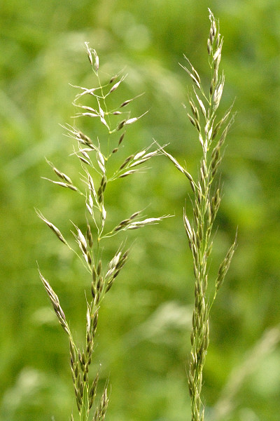 Trisetum flavescens from Commanster, Belgian High Ardennes .